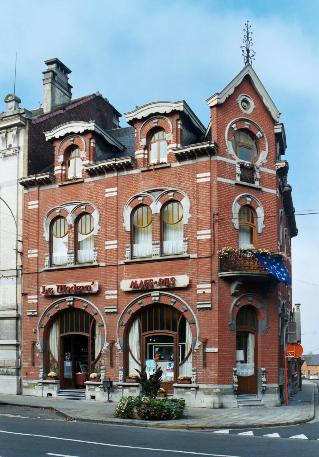 Modern Hôtel, Soignies, Architecte Emile François